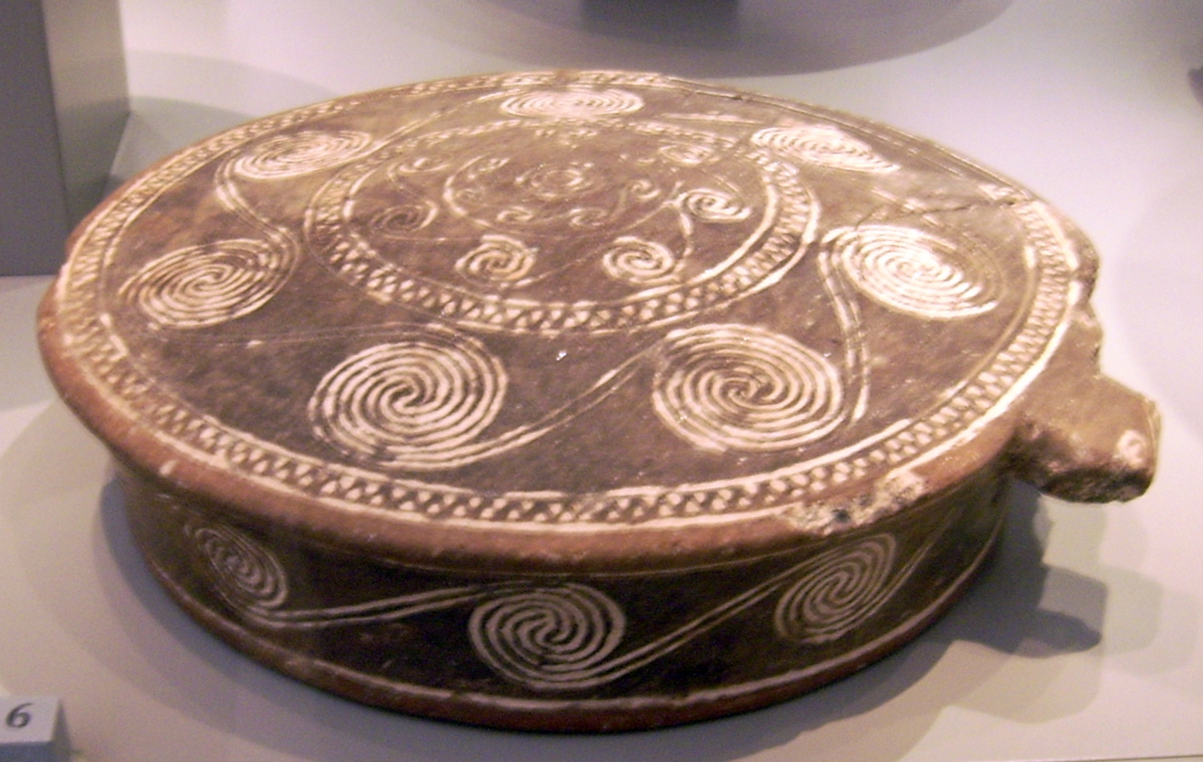 Sogenannte Kykladenpfanne, Ton, um 2700/2300 v. Chr., Stiftung durch E. und F. Brommer, Altes Museum: Antikensammlung Berlin